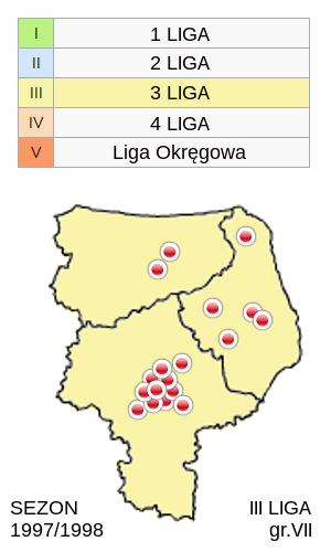 Jagiellonia Białystok w sezonie 1997/1998 -mapka